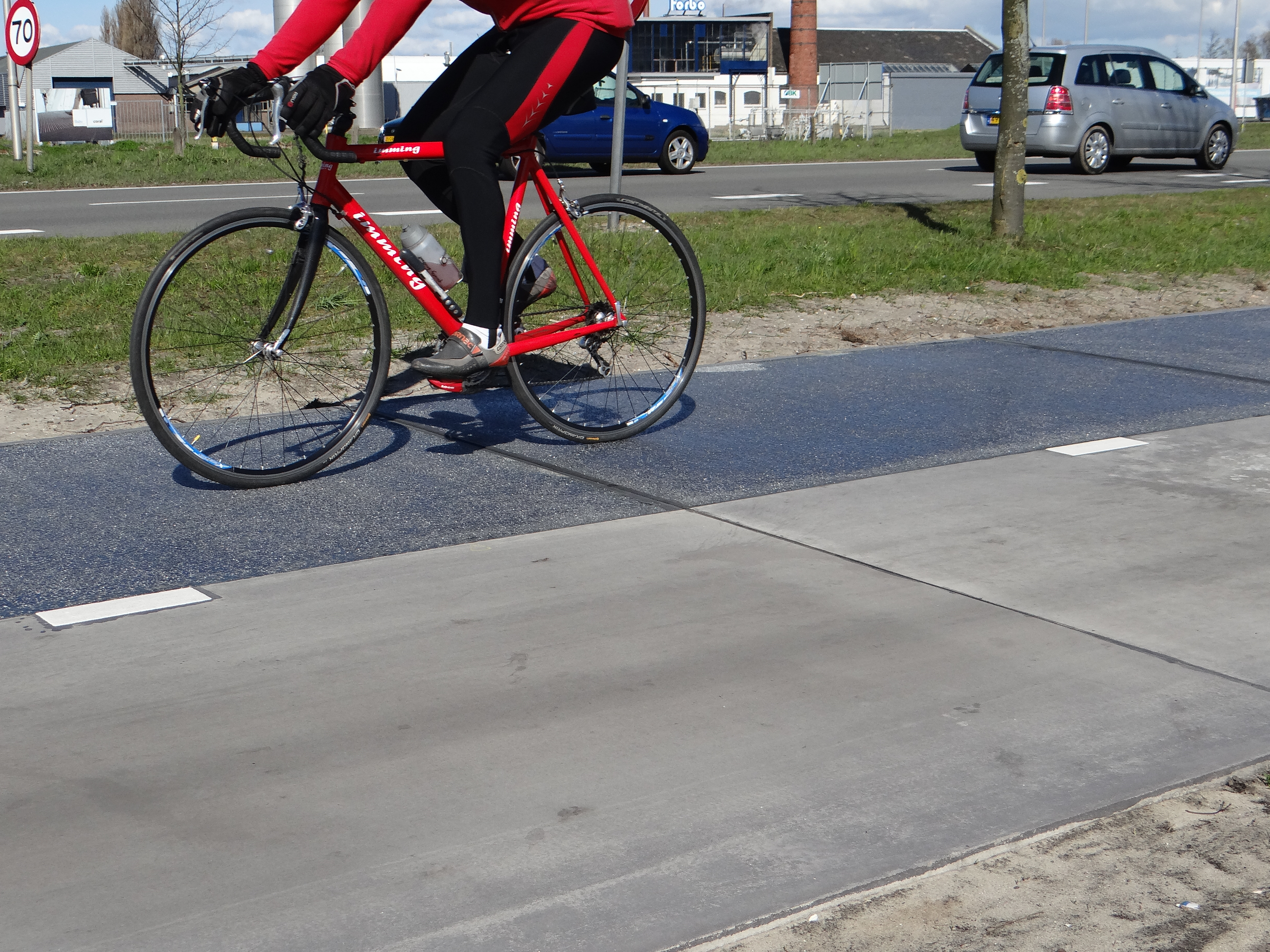 Solaroad14